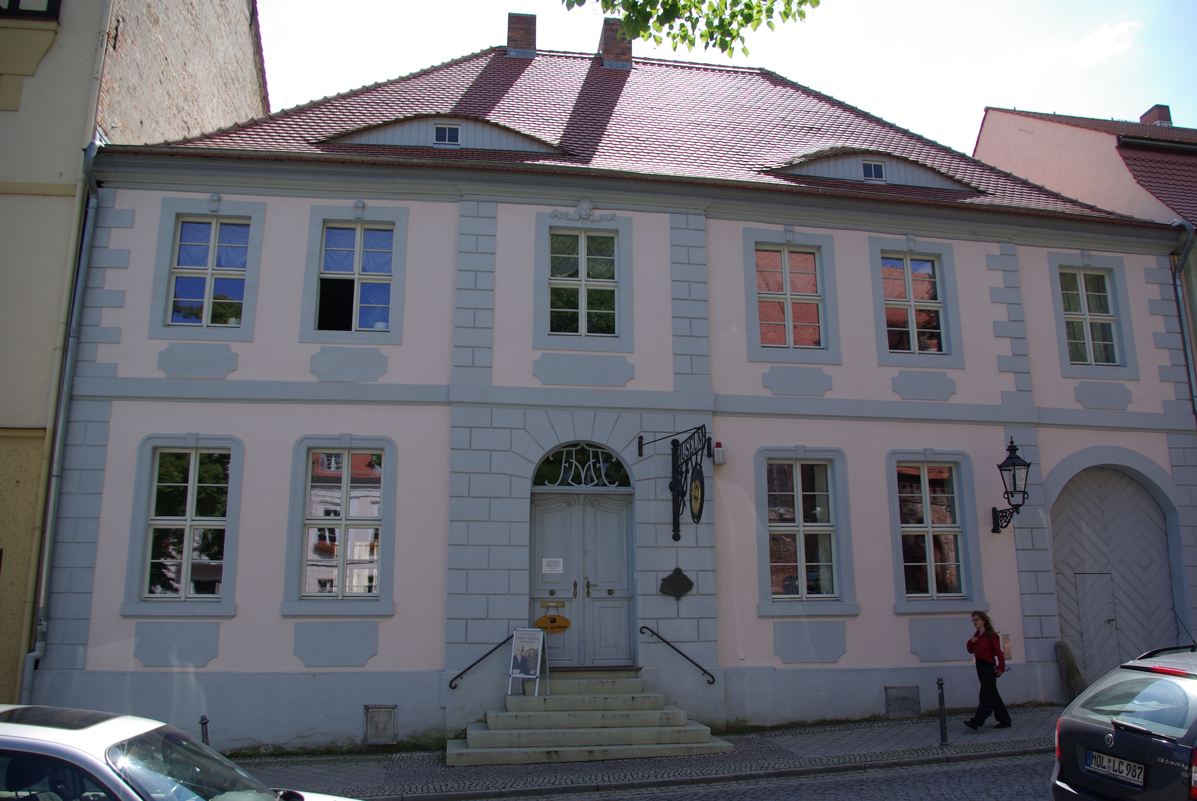 Bad Freienwalde / Oder in Brandenburg. Das Haus in der Uchtenhagenstraße 2 steht unter Denkmalschutz.